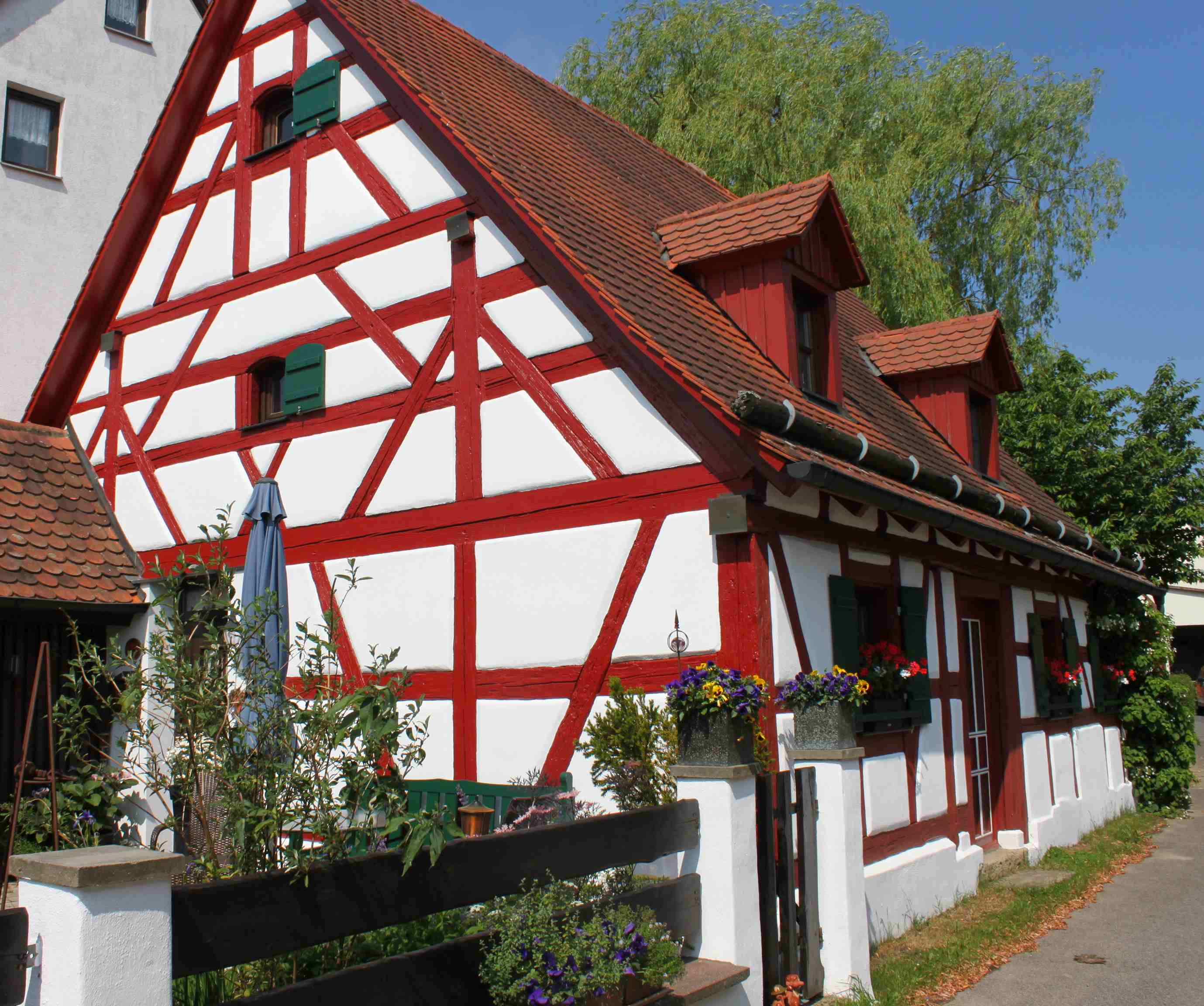 Im Ortskern von Großviehberg steht das Hirtenhaus. Der Hirte nahm früher eine besondere Stellung in der Gemeinschaft ein, er wurde gewählt und hütete hauptsächlich das gehörnte Vieh.